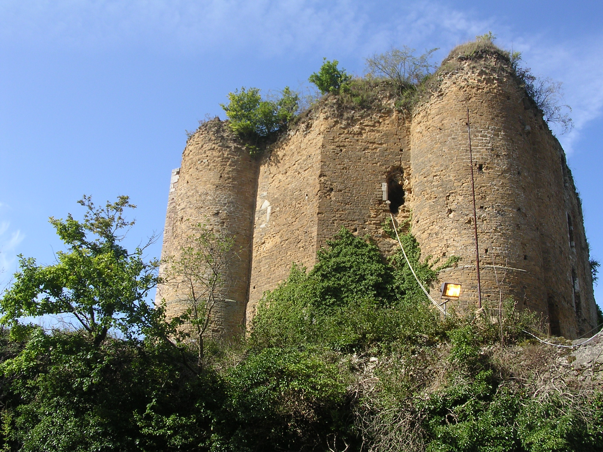 Ruines du château-fort de Franchimont (XIVe, XVe et XVIe siècles)